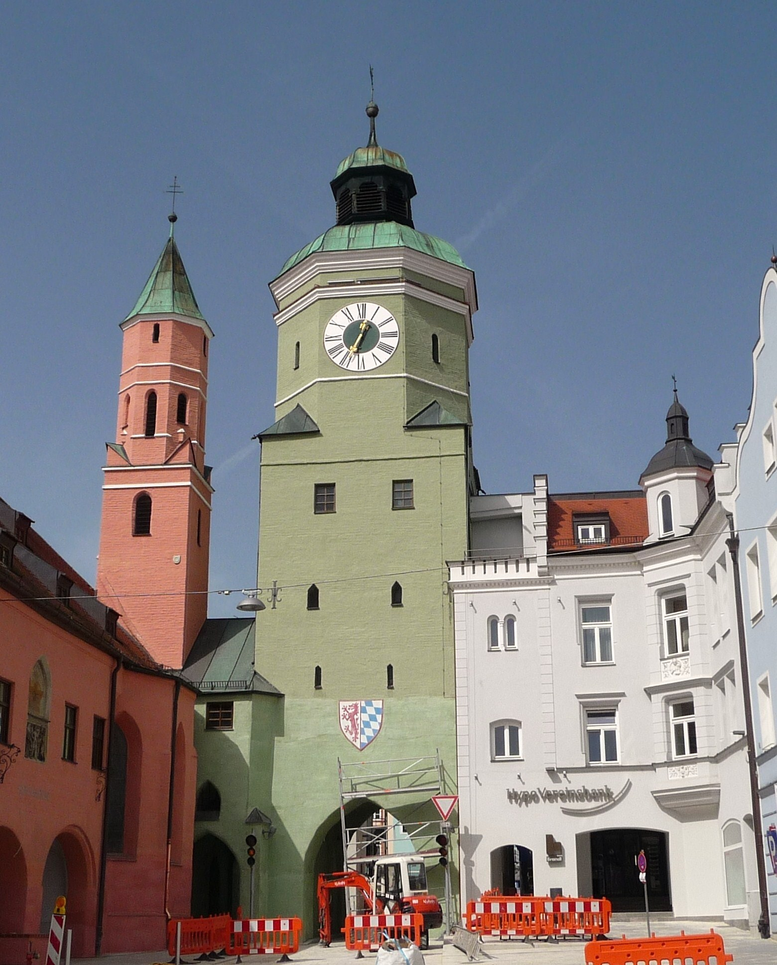 Der obere Torturm am Marktplatz von Vilsbiburg